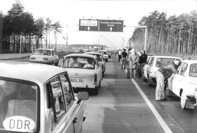 ADN-ZB-Pätzold-12.11.89- Bez. Schwerin: Tausende DDR-Bürger passierten mit ihrem PKw den Grenzübergang Zarrentin im Bezirk Schwerin. Trotz zügiger Abfertigung kam es hier zeitweise zu Staus bis zu 2 Kilometern.